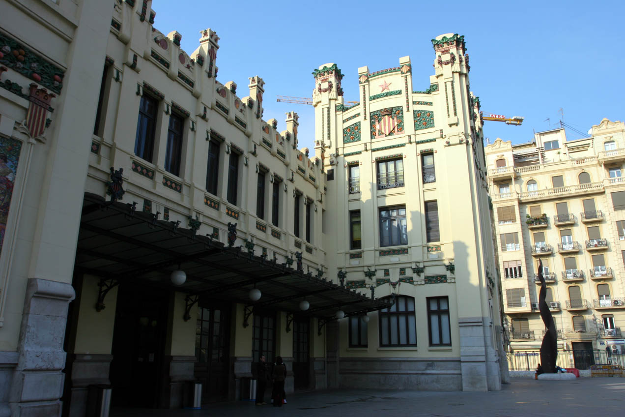 Estació del Nord, Ciutat de València. Vista parcial des de l'exterior.